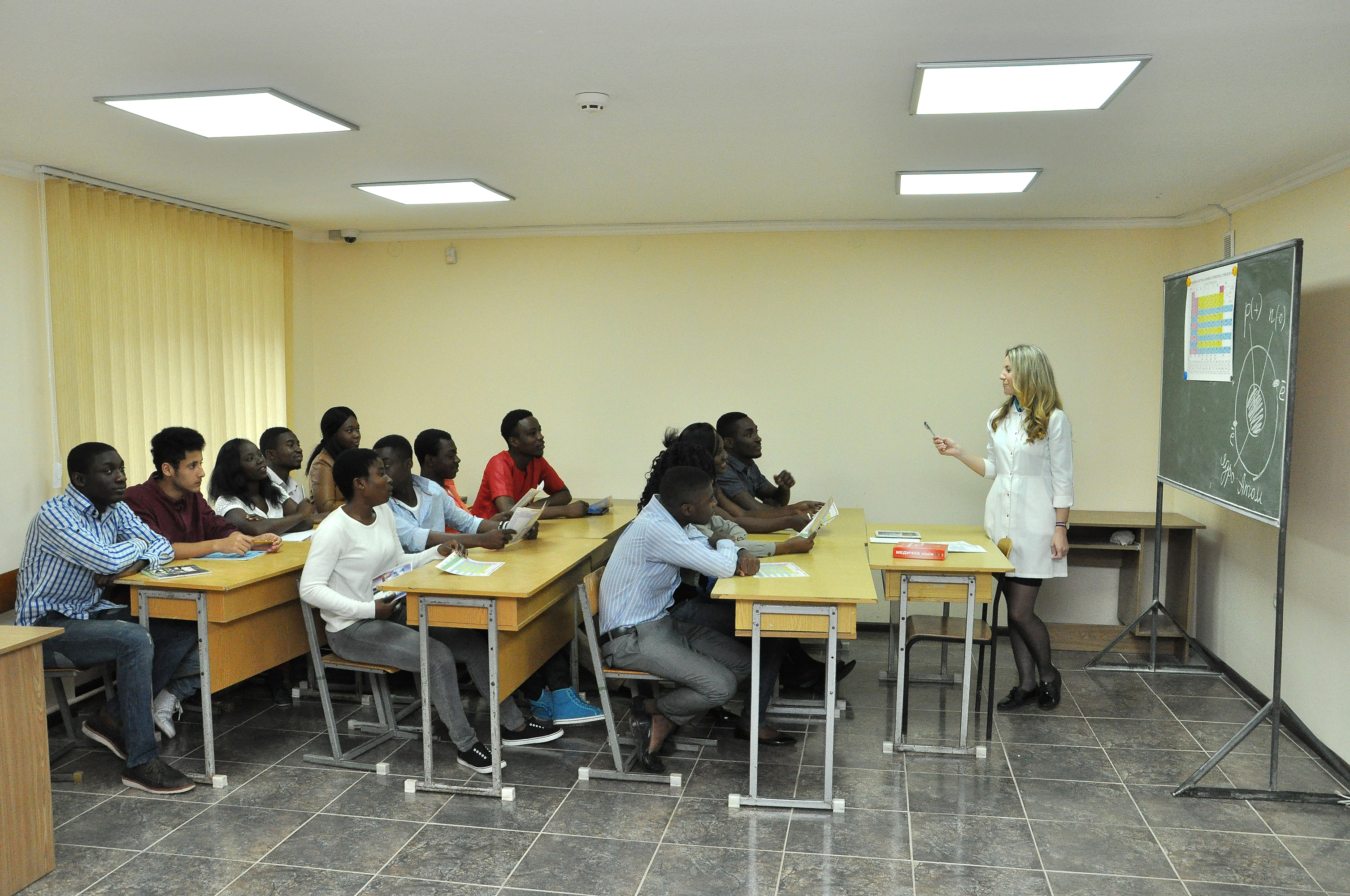 Підготовче відділення для іноземців та осіб без громадянства Тернопільського державного медичного університету імені І. Я. Горбачевського. Урок хімії проводить Оксана Тарасюк.